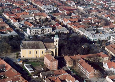 Kiskunmajsa, Hungary, aerialphotography, Boldogságos Szűz Mária római katolikus templom